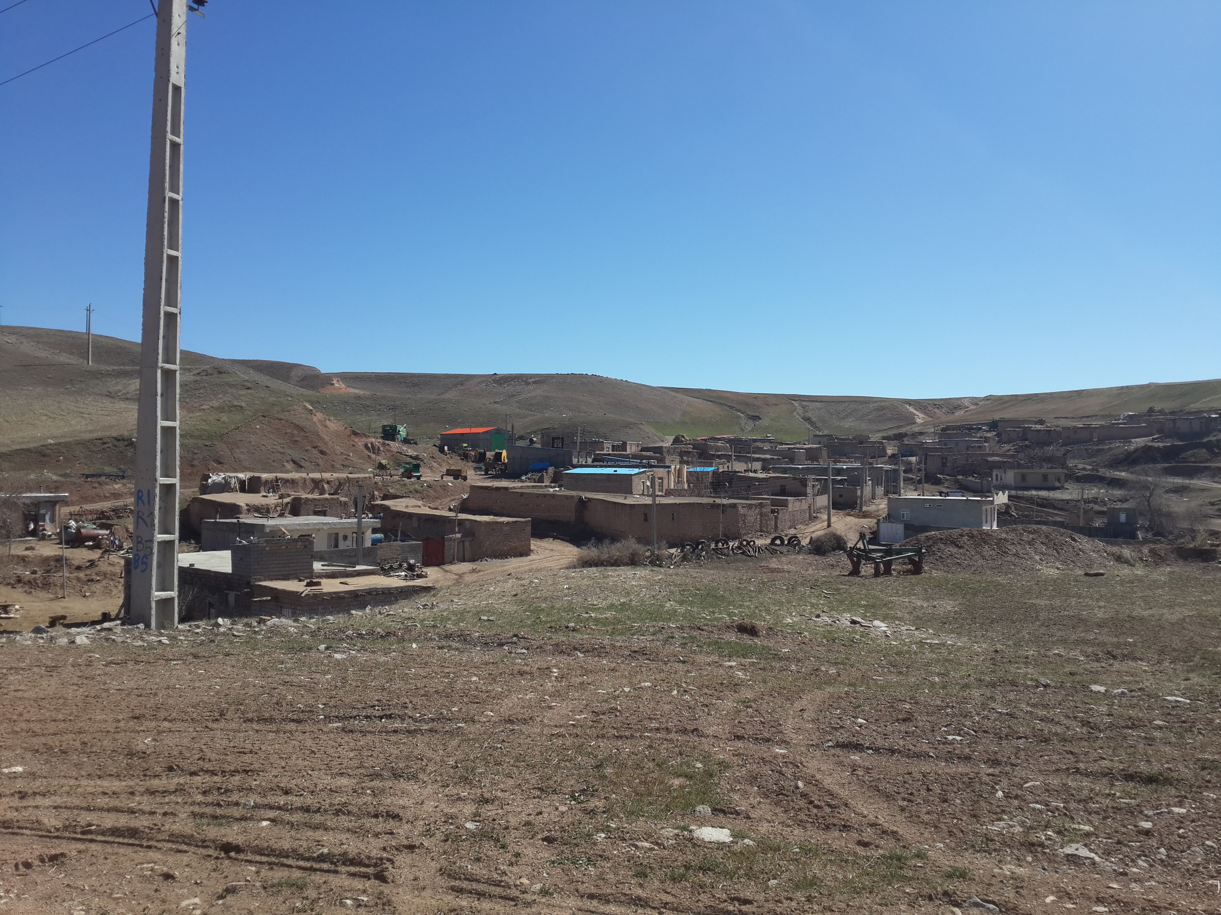 روستای قوپوز